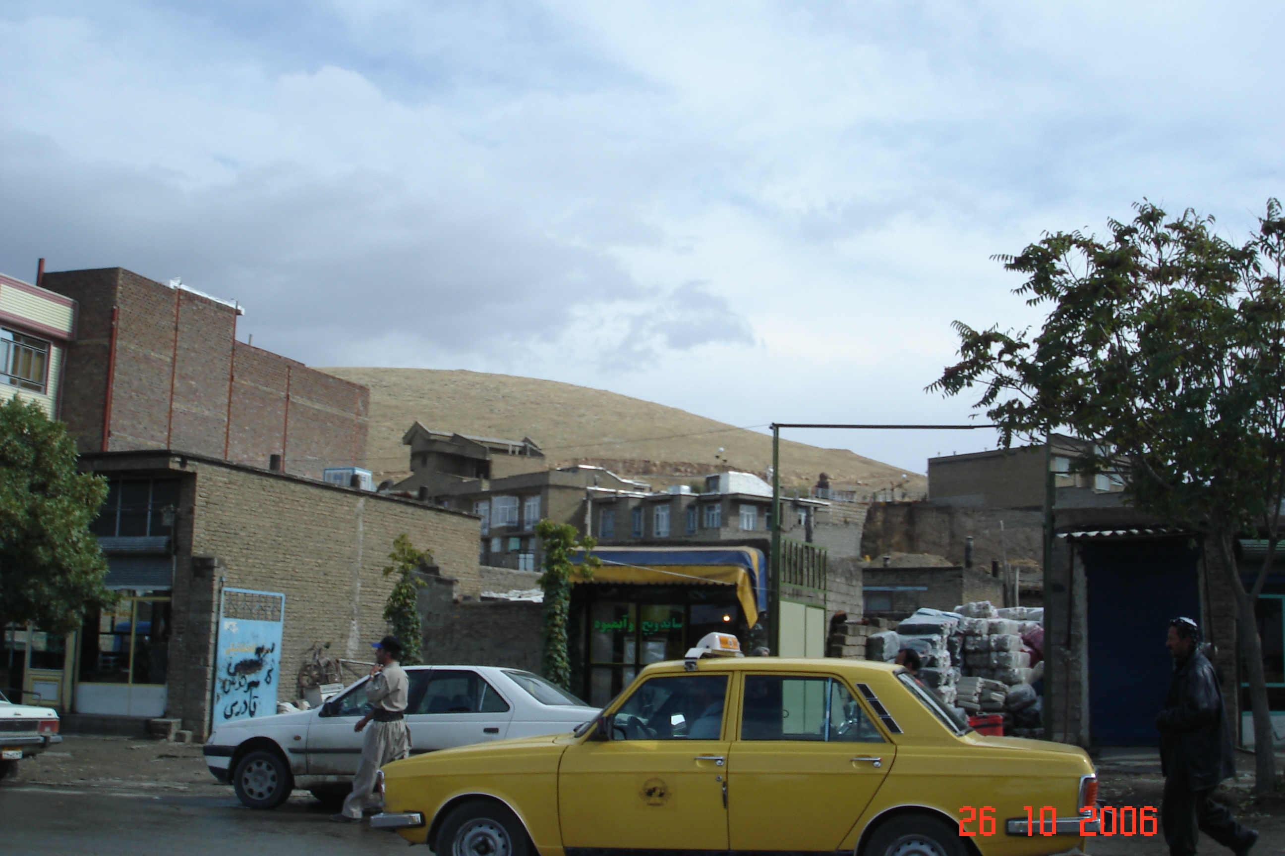 Bokan